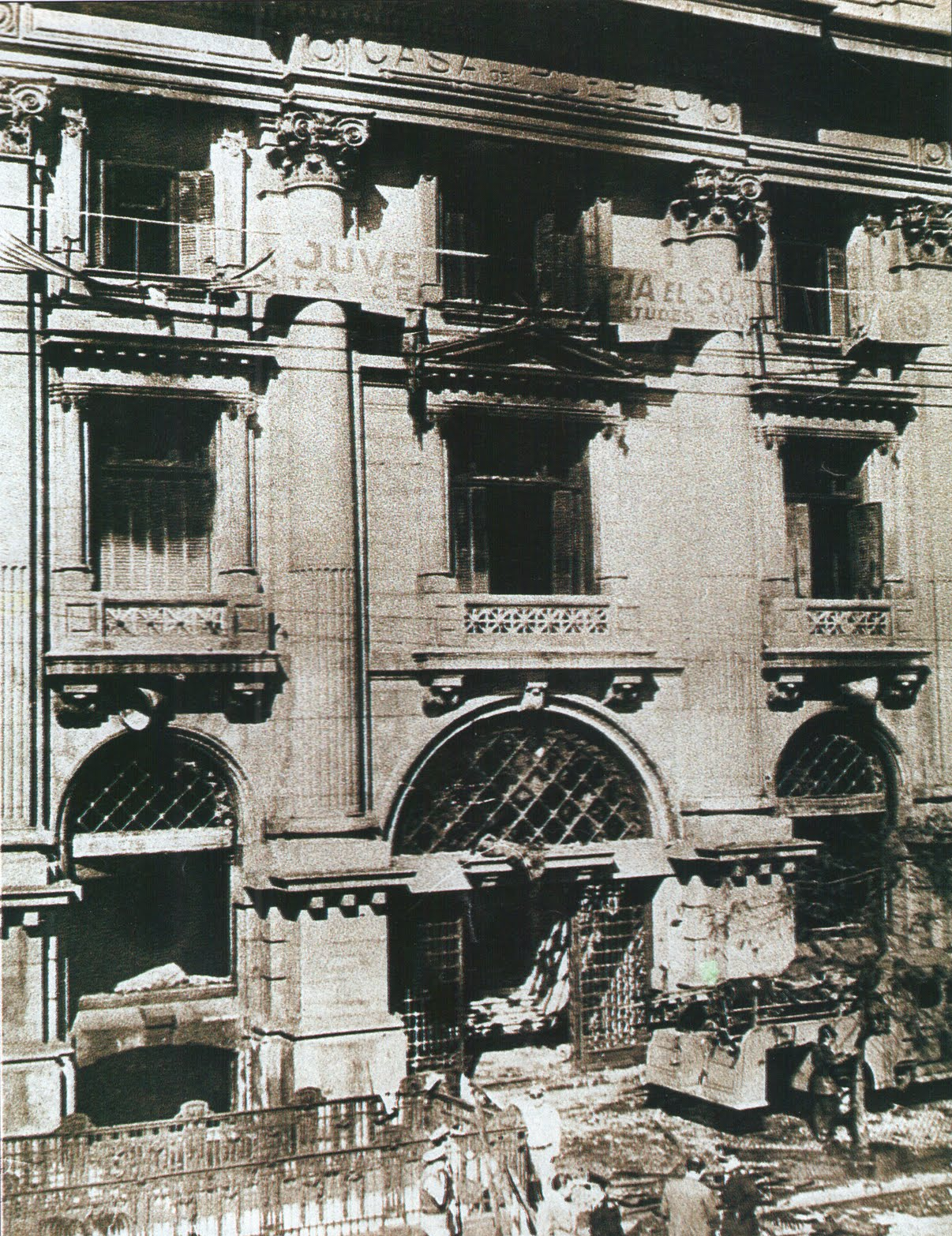 Casa del Pueblo luego de ser destruida el 15 de abril de 1953.